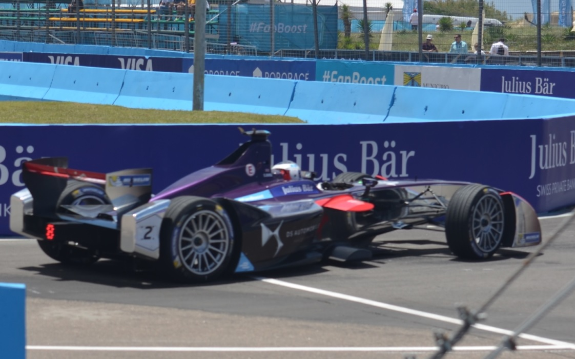 Prototipo Spark-Citroën Virgin Racing DSV-01 del equipo DS Virgin Racing Formula E Team. IMagen aumentada de una fotografía tomada por el usuario Velocidad Total, el 2015-12-19 a las 03:27:05